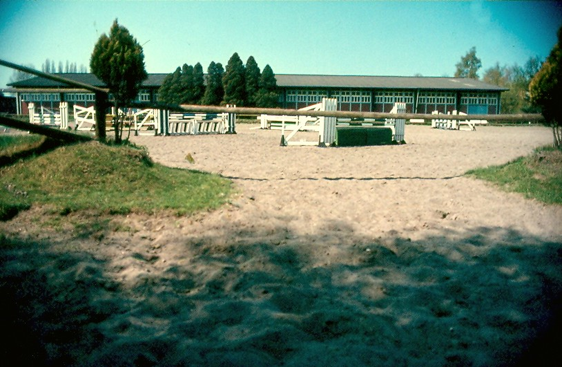 Große Reithalle und Springplatz Westfälische Reit und Fahrschule 1984